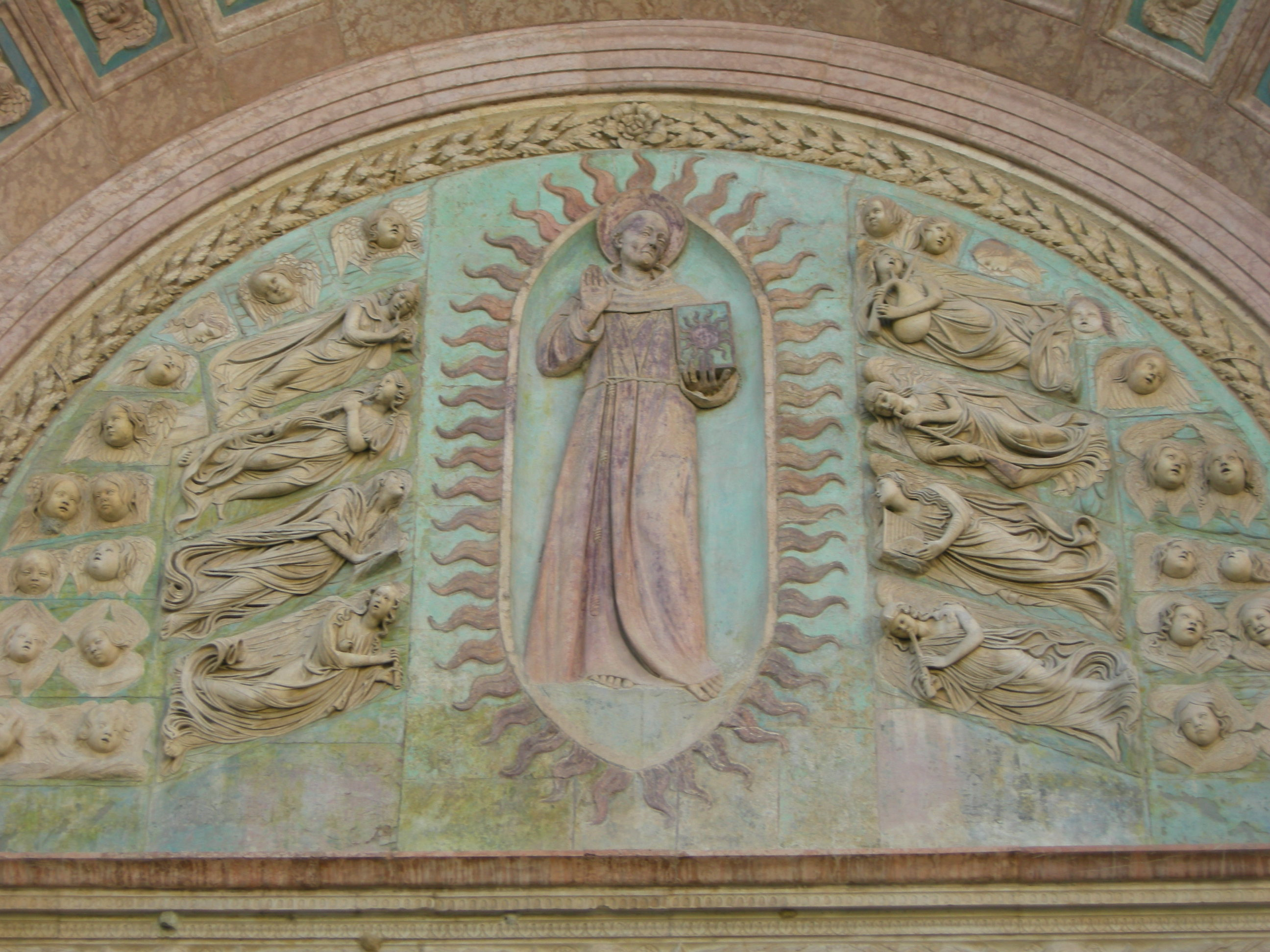 Perugia, oratorio di san bernardino, rilievi facciata di agostino di duccio. Der Heilige wird umrahmt von einer Sonnen-Mandorla, umgeben von musizierenden Engeln und Putti.